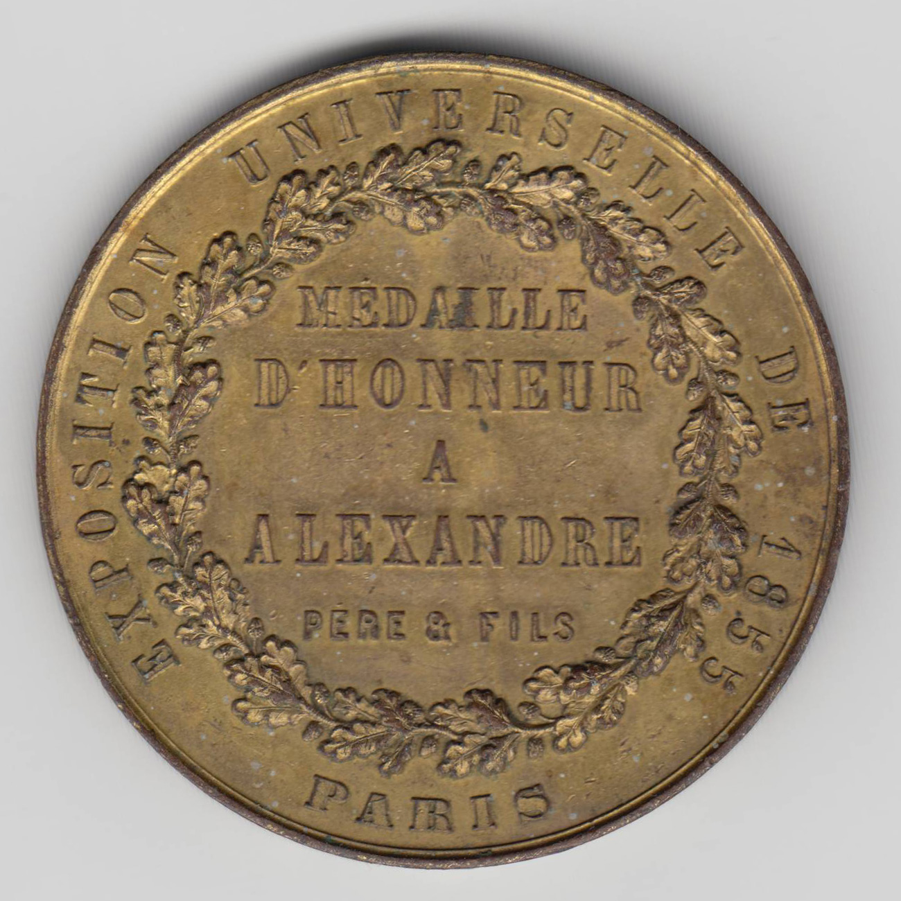 Ehrenmedaille der Weltausstellung 1855